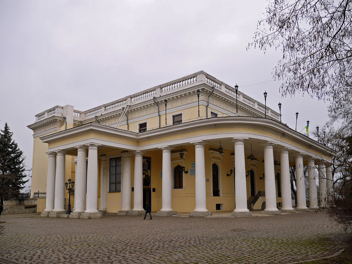 Палац, в якому жили генерал-губернатор Новоросійського краю, герой Вітчизняної війни 1812 р. князь М.С.Воронцов, його дружина Є.К.Воронцова; у 1917 році містилася Рада робітничих депутатів м.Одеси, Одеса, пров. Воронцовський, 2